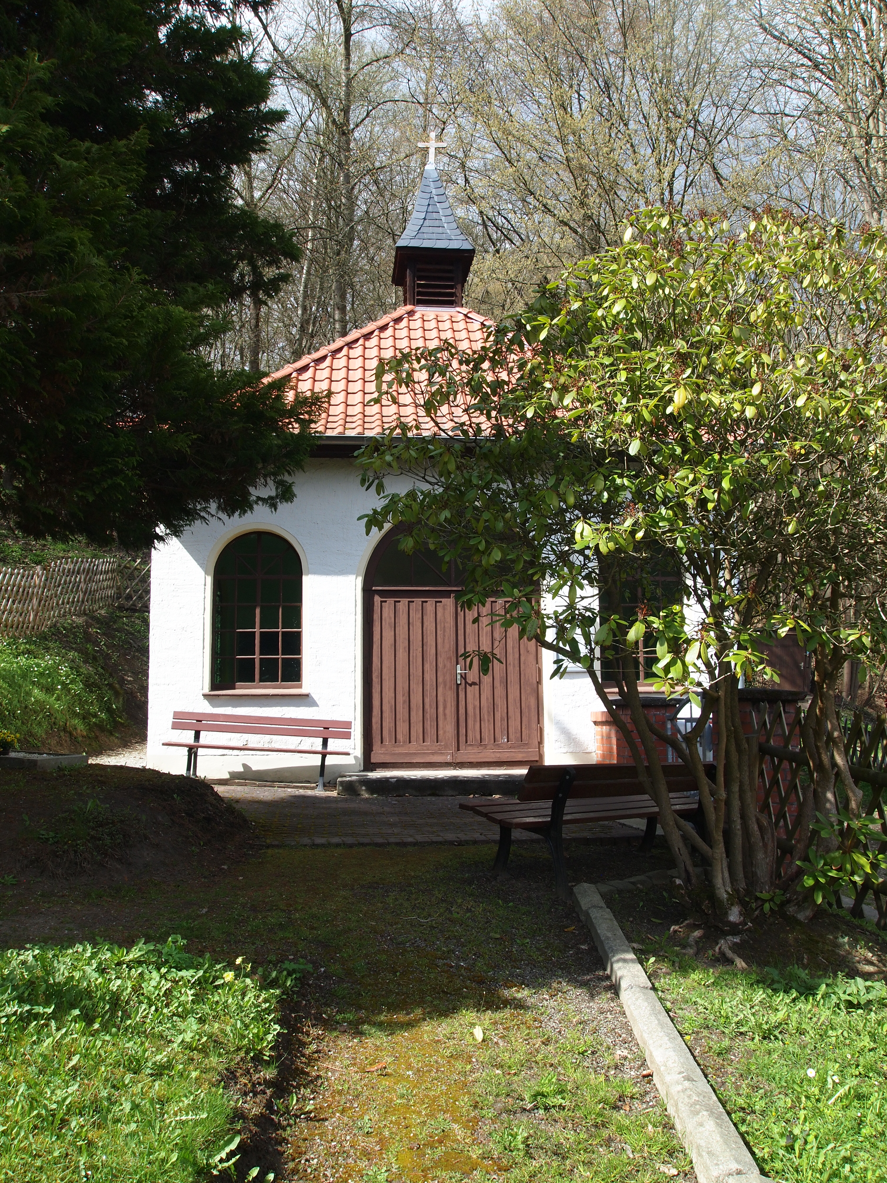 Treseburg (Stadt Thale, Landkreis Harz; Sachsen-Anhalt) Friedhofskapelle